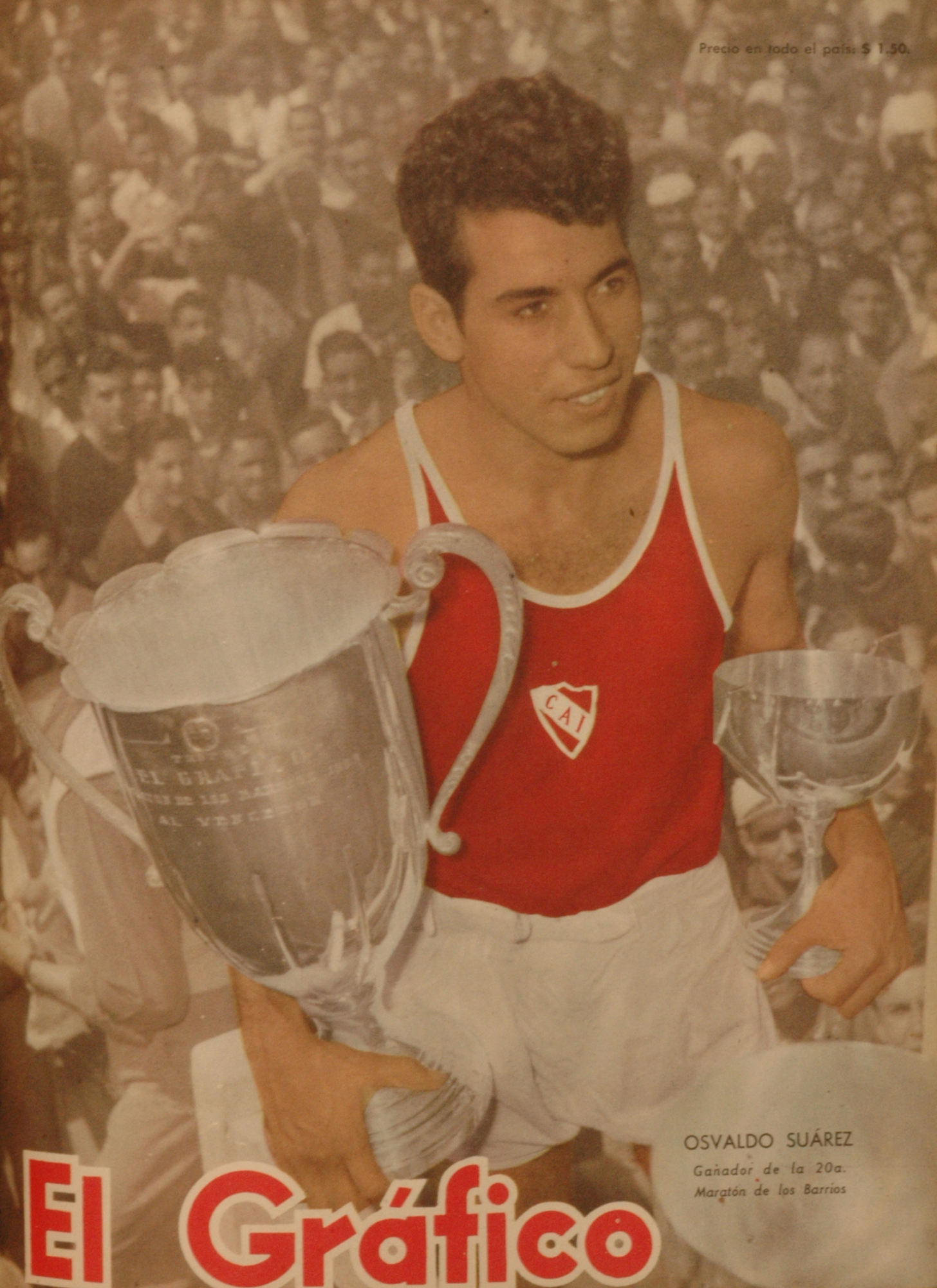 El Grafico del 11 de Diciembre de 1953. Edicion 1792